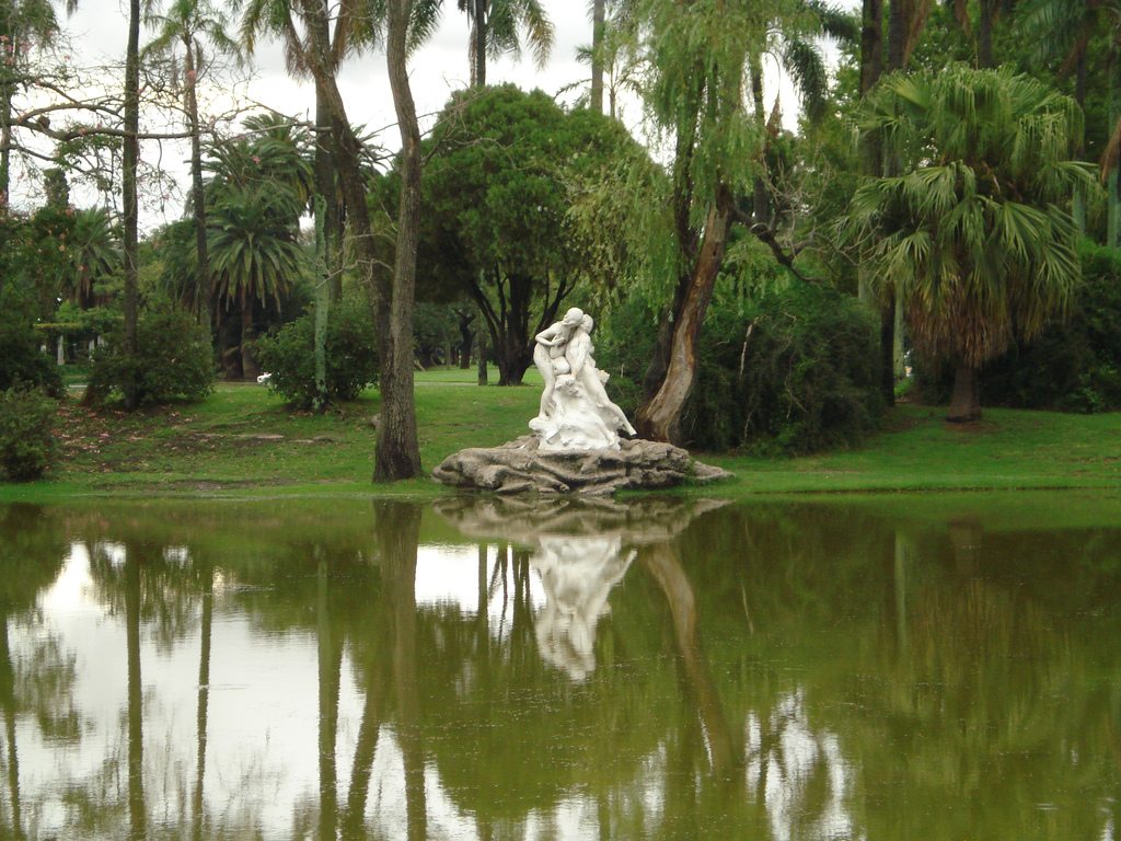 "El beso" (The kiss), del escultor Jean Paul Baptiste Gask. Representa a Leandro y Hero de la mitología griega. El Rosedal, Bosques de Palermo, Buenos Aires.